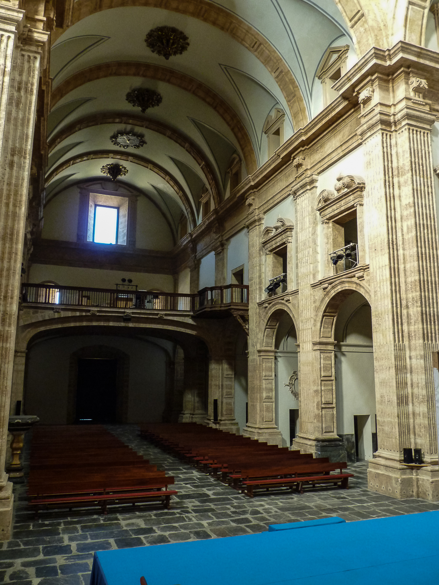 CONVENTO DE SAN MIGUEL DE LOS REYES DE VALENCIA 06122009 121605 00016.jpg